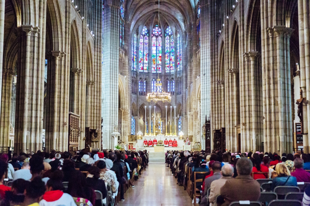 13 octobre 2019 : Messe célébrée par Mgr DELANNOY lors de la fête annuelle de Saint-Denis en la Cathédrale Saint-Denis. Saint-Denis (93), France.